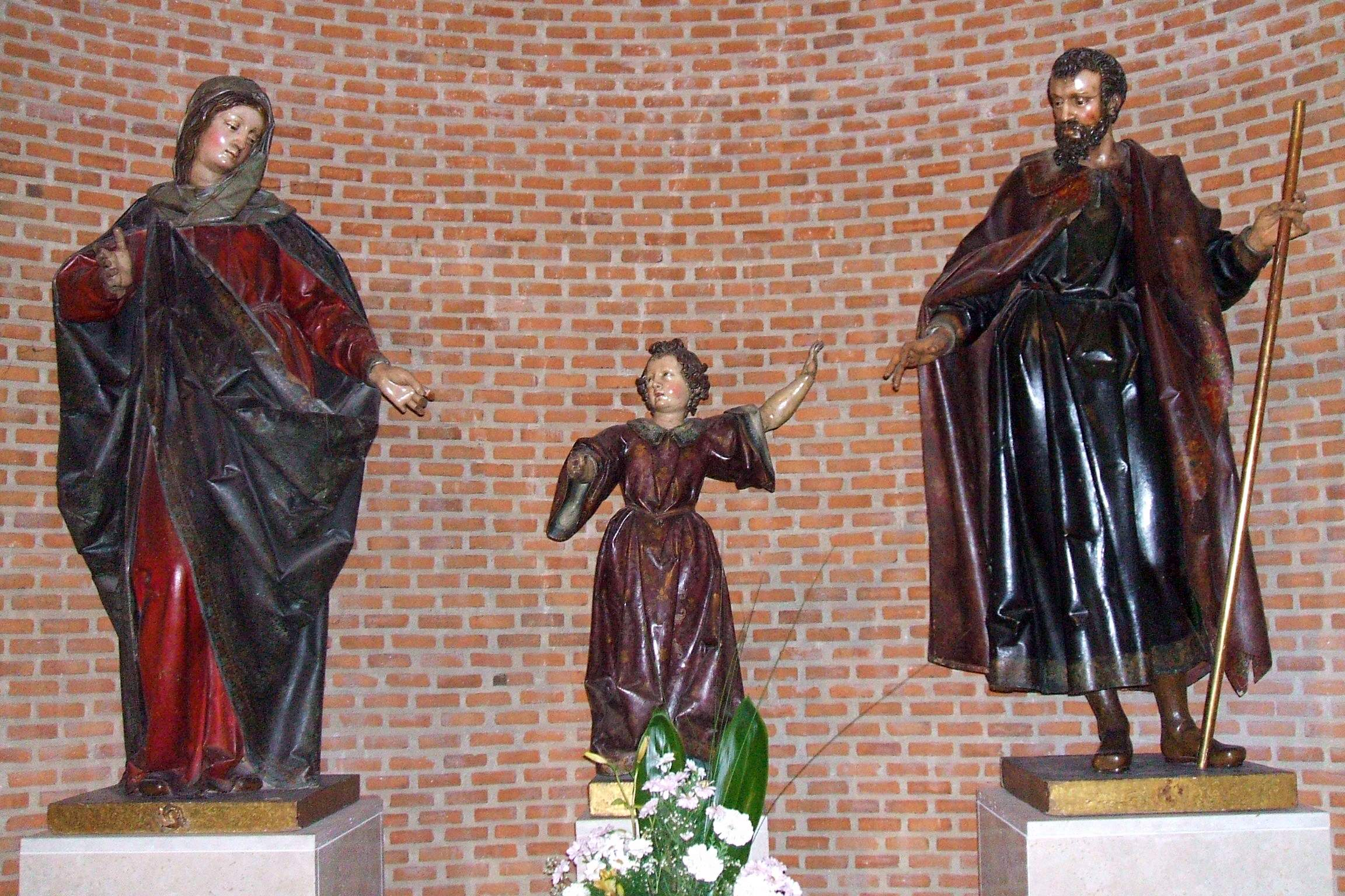 Iglesia de San Lorenzo (Valladolid)